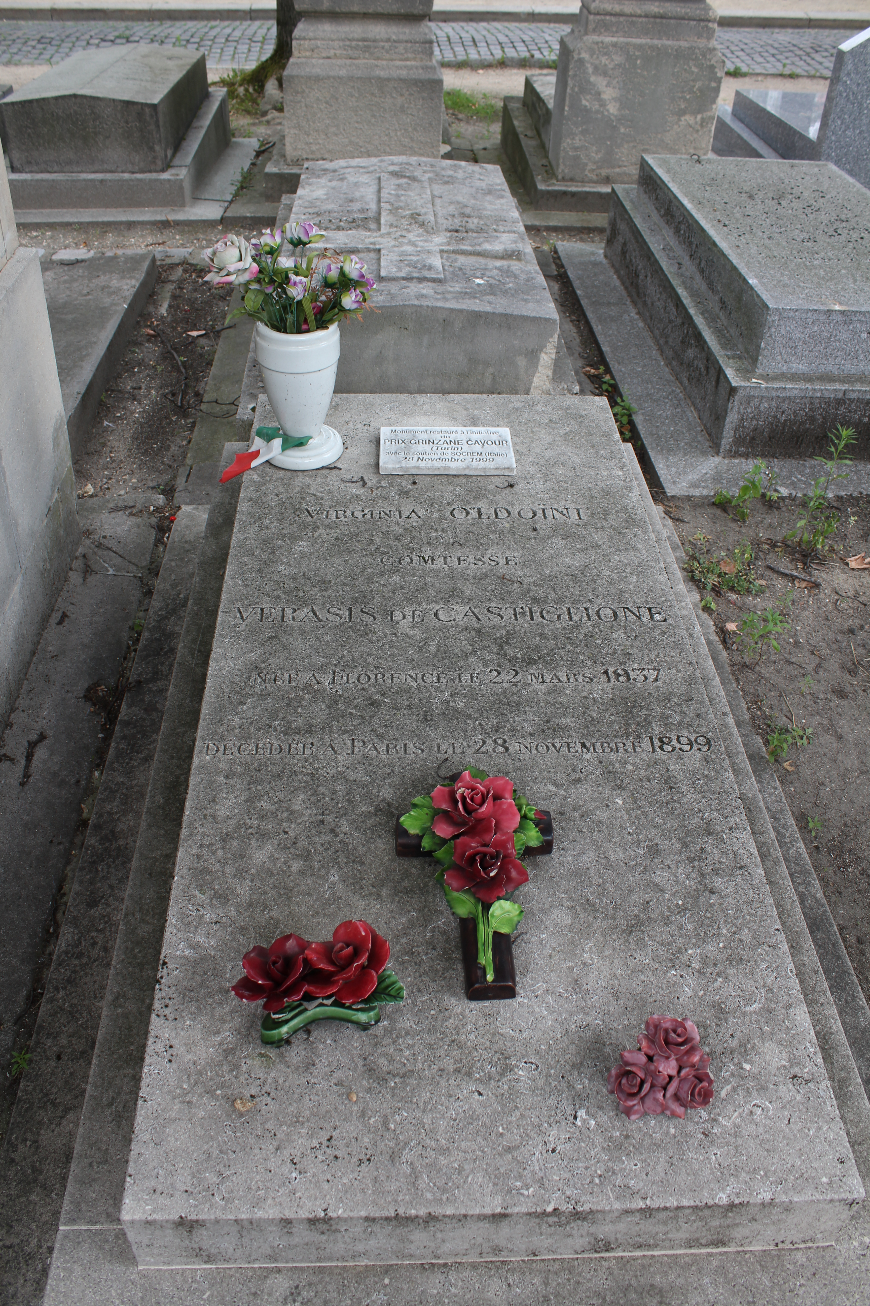 Dalle funéraire.